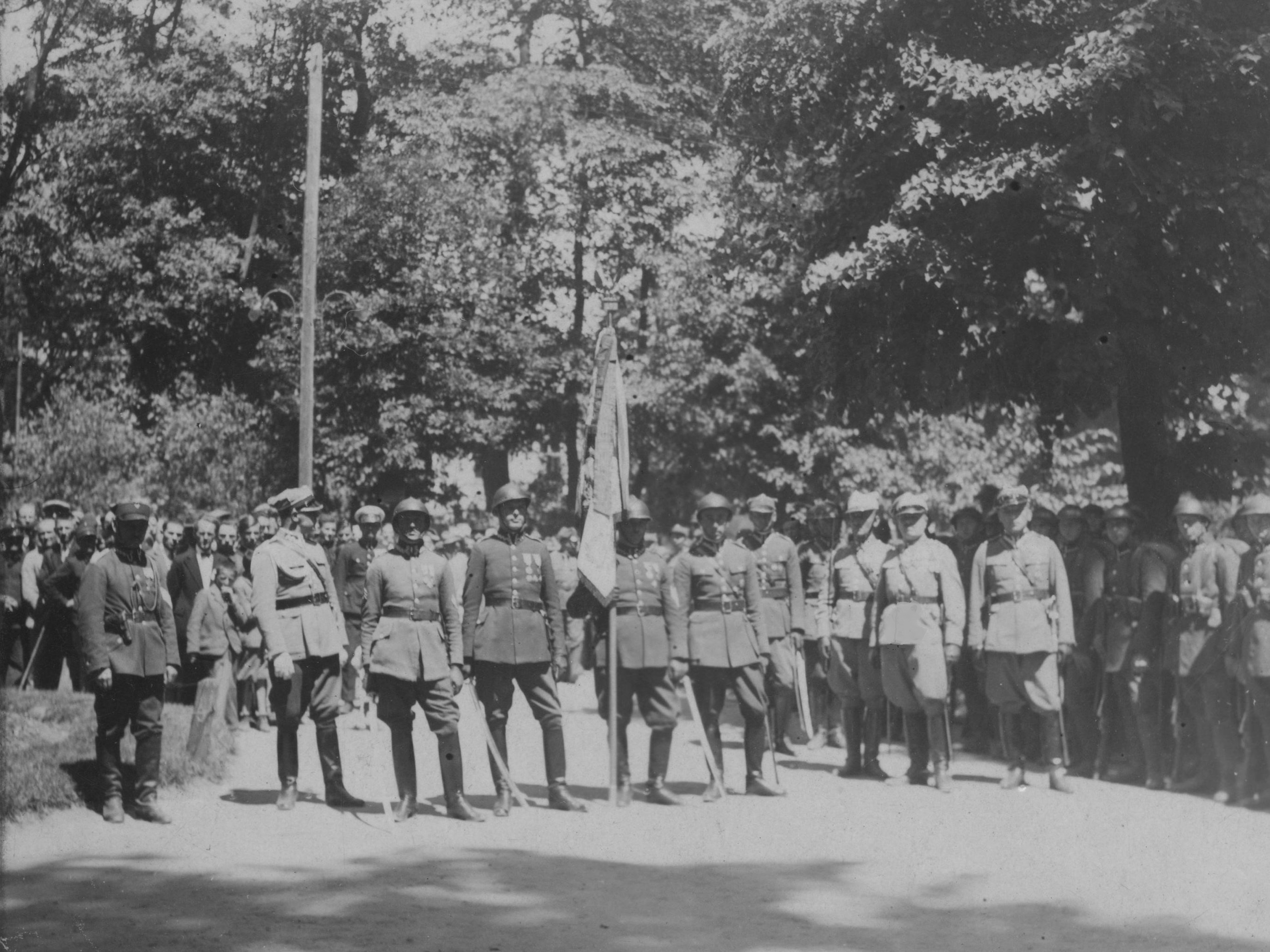 Święto 22 Pułku Ułanów Podkarpackich w Brodach; lipiec 1931 r. Fragment defilady wojsk garnizonu brodzkiego przed korpusem oficerskim tego garnizonu. Widoczny m.in. ppłk Stanisław Janusz Rostworowski. Koncern Ilustrowany Kurier Codzienny - Archiwum Ilustracji. Sygnatura: 1-W-1427